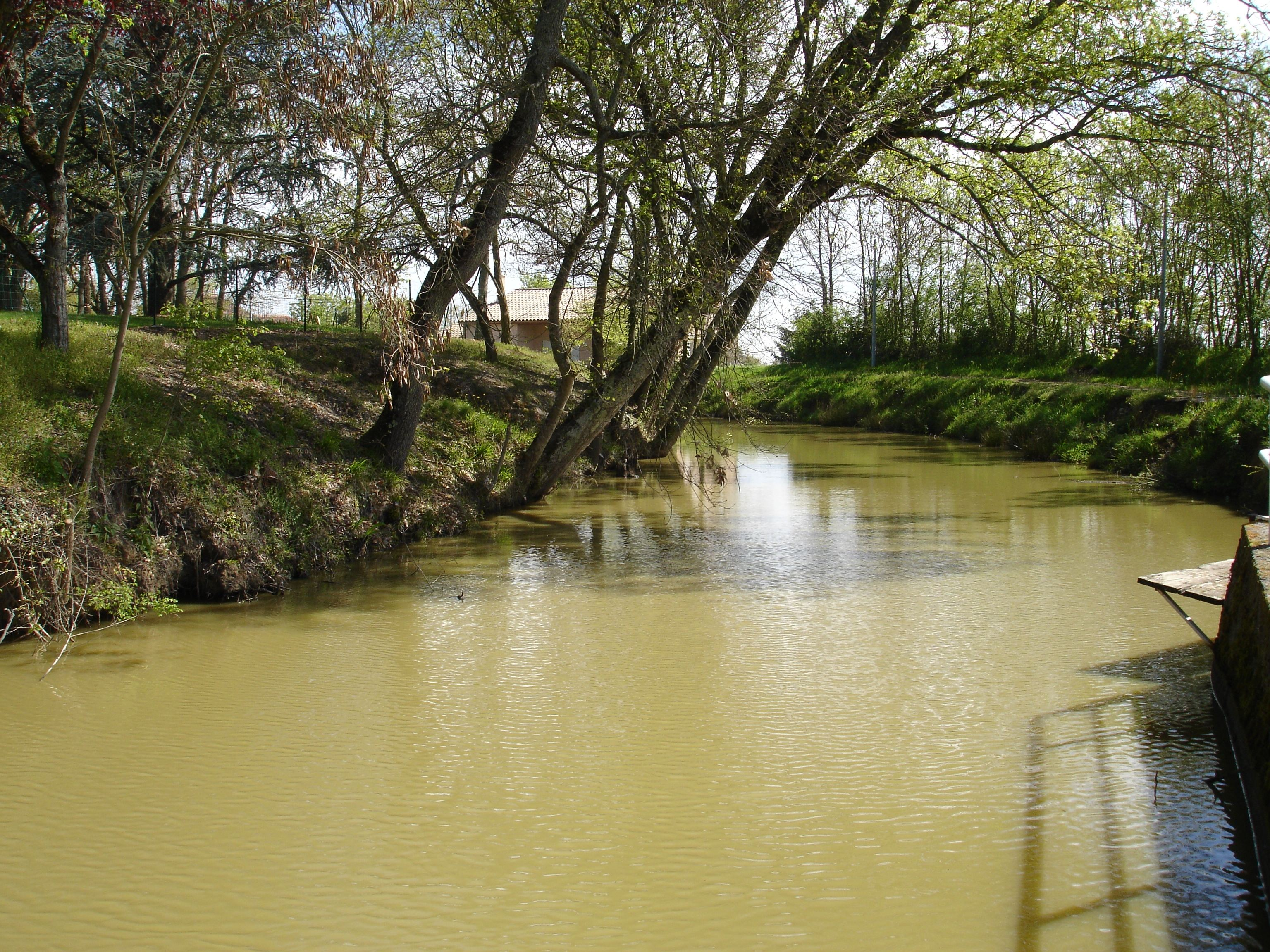 Photographie personnelle. Bouchard.daniel 10 décembre 2006 à 21:44 (CET)